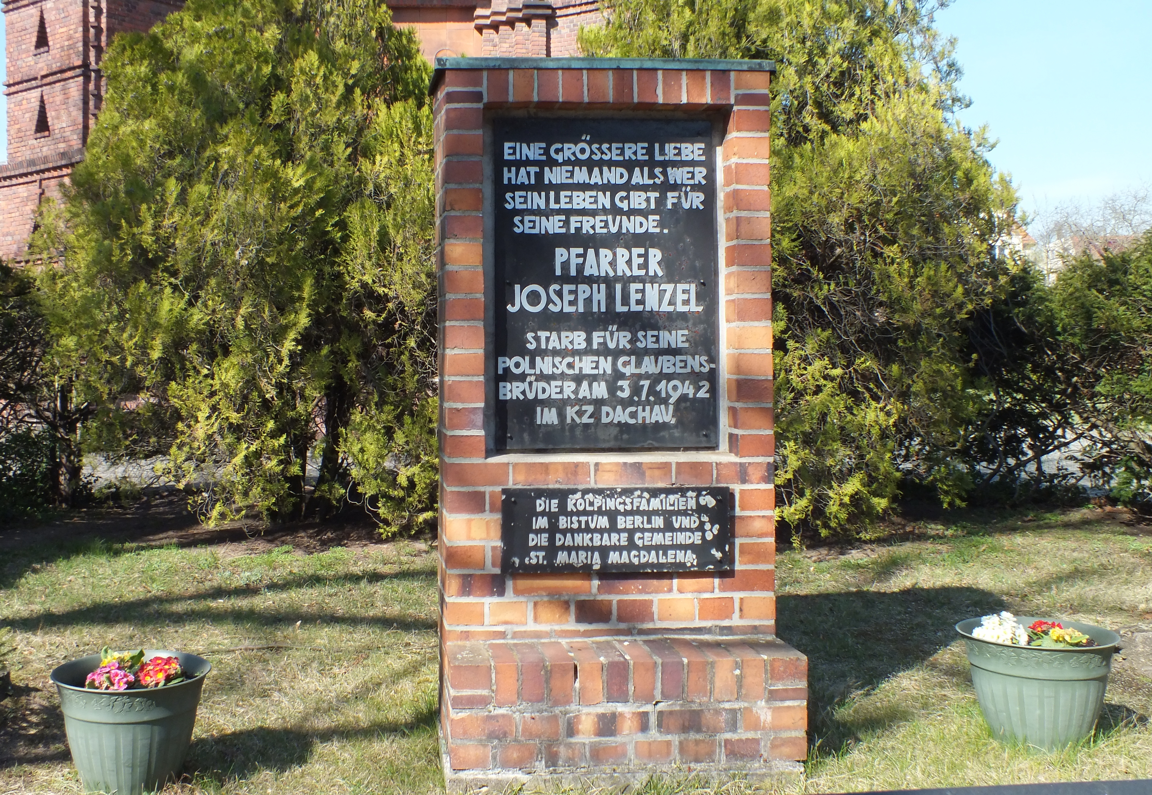 Kirche Maria Magdalena, Berlin-Niederschönhausen: Denkmal für Pfarrer Lenzel